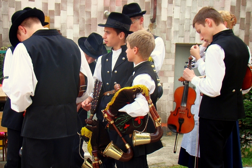 Die Oberländler von Polen-südost, Bewohner(in), die aus dem Oberland (polnisch Pogórze beskidzkie) stammt, Harta 2012